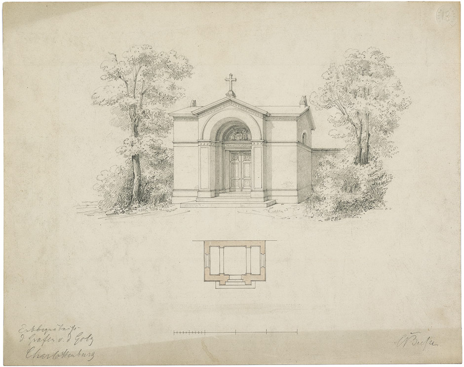 Das Mausoleum der Grafen von der Goltz in Charlottenburg. Bleistift, teils aquarelliert. 30,8 x 38,5 cm